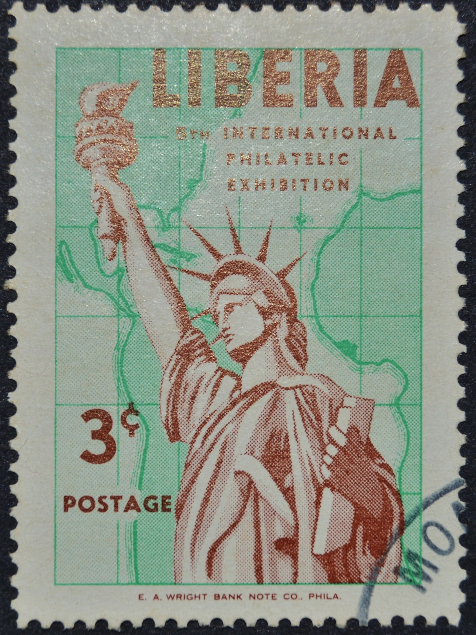 Selo de 3c da Libéria, emitido em 1956 e integrado na série que assinala a 5ª Exposição Filatélica Internacional.